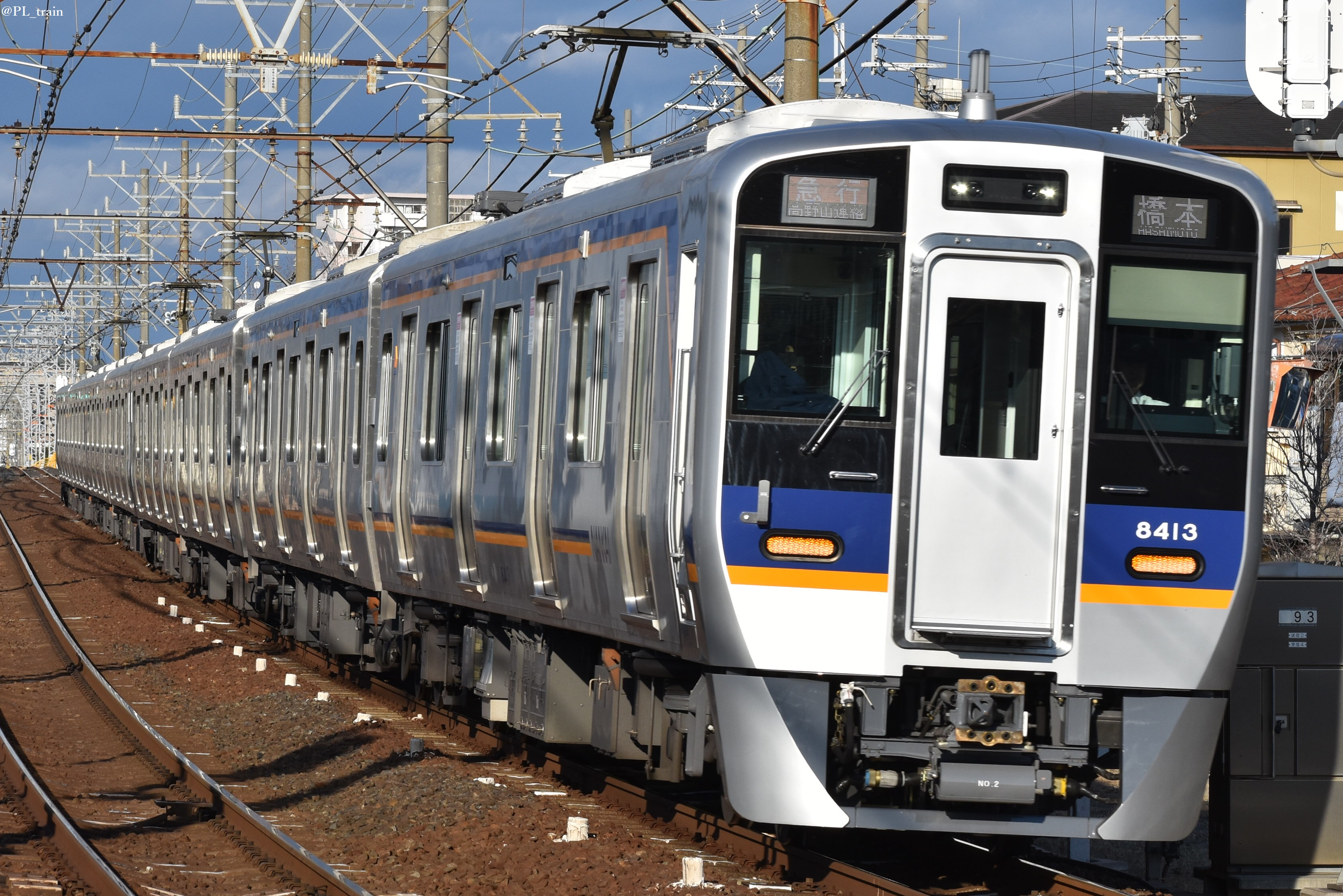 8300系電車 浅香山にて